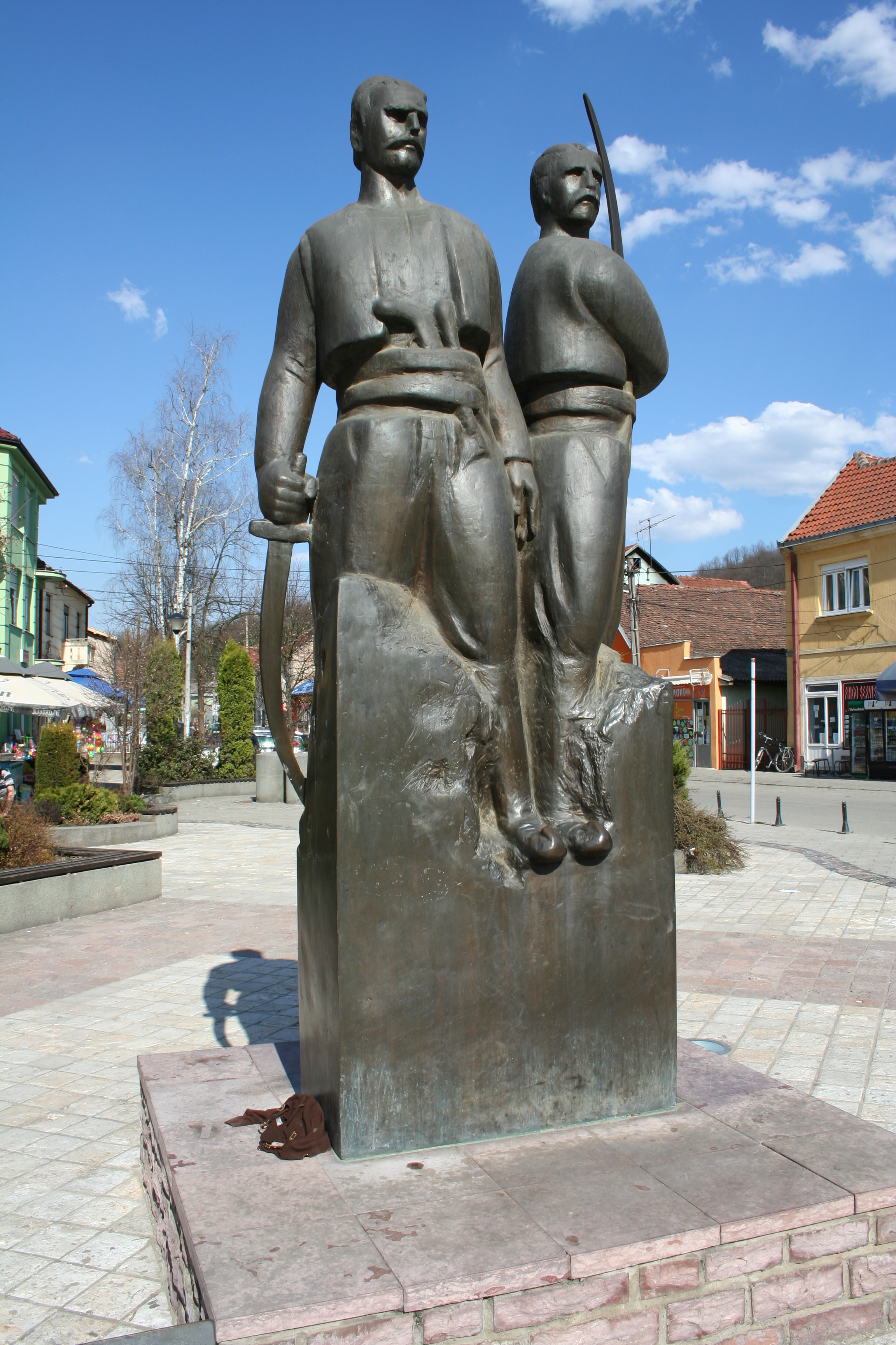 Spomenici i zgrade u Osečini